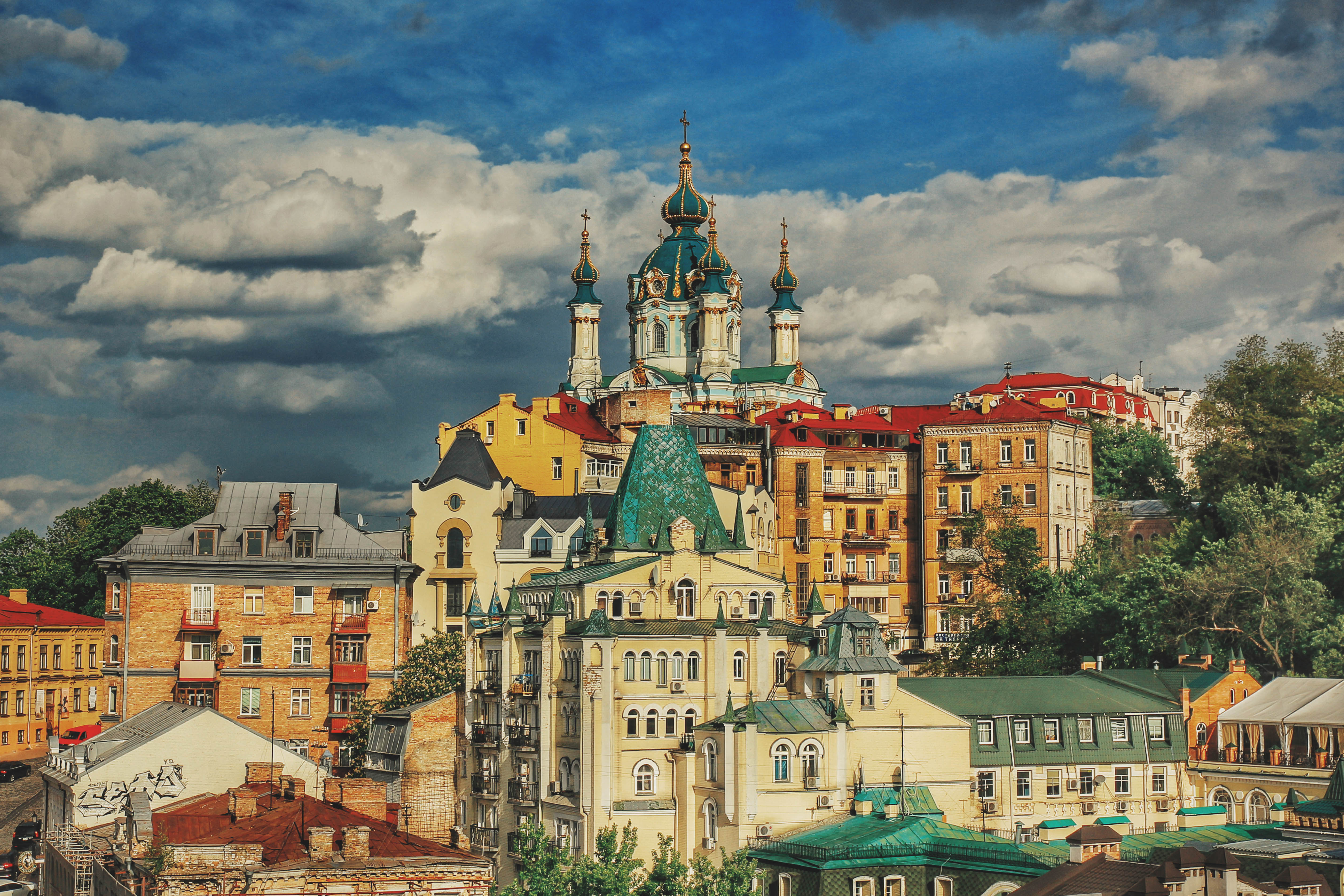 Церква Андріївська, Київ, Андріївський узвіз, 23